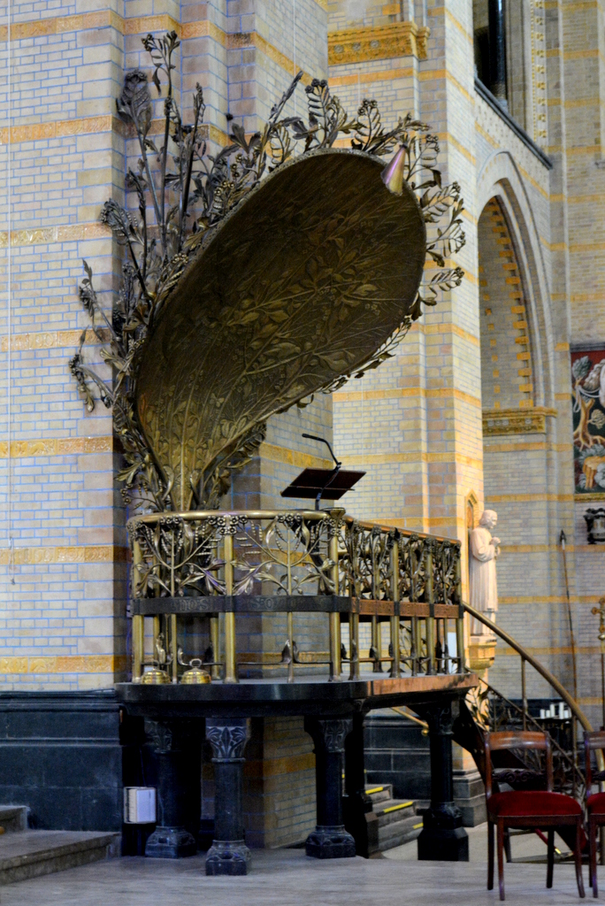 Haarlim, Sint-Bavokatedraal, ynterieur, preekstoel